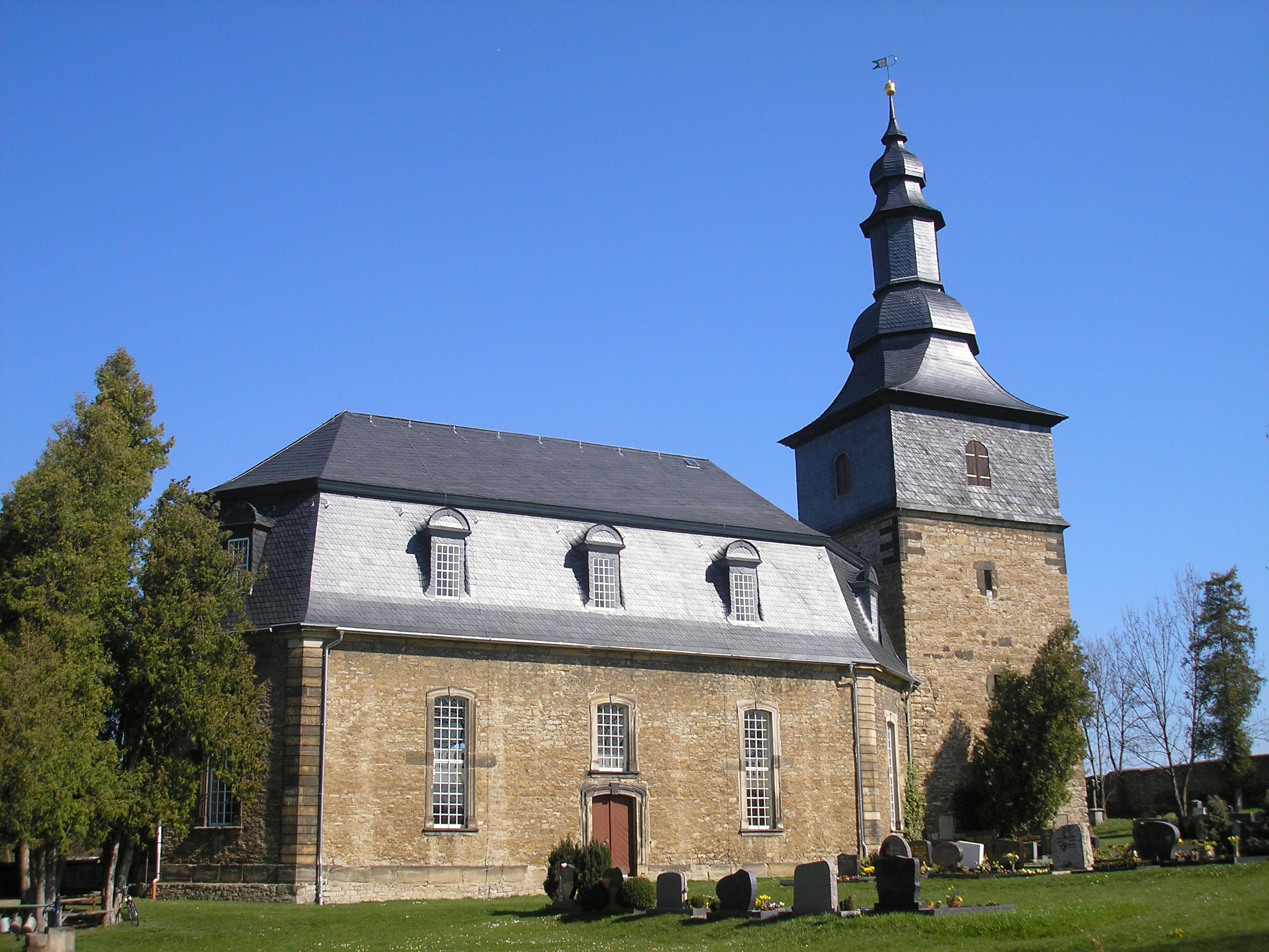 Die Kirche in Büßleben bei Erfurt.